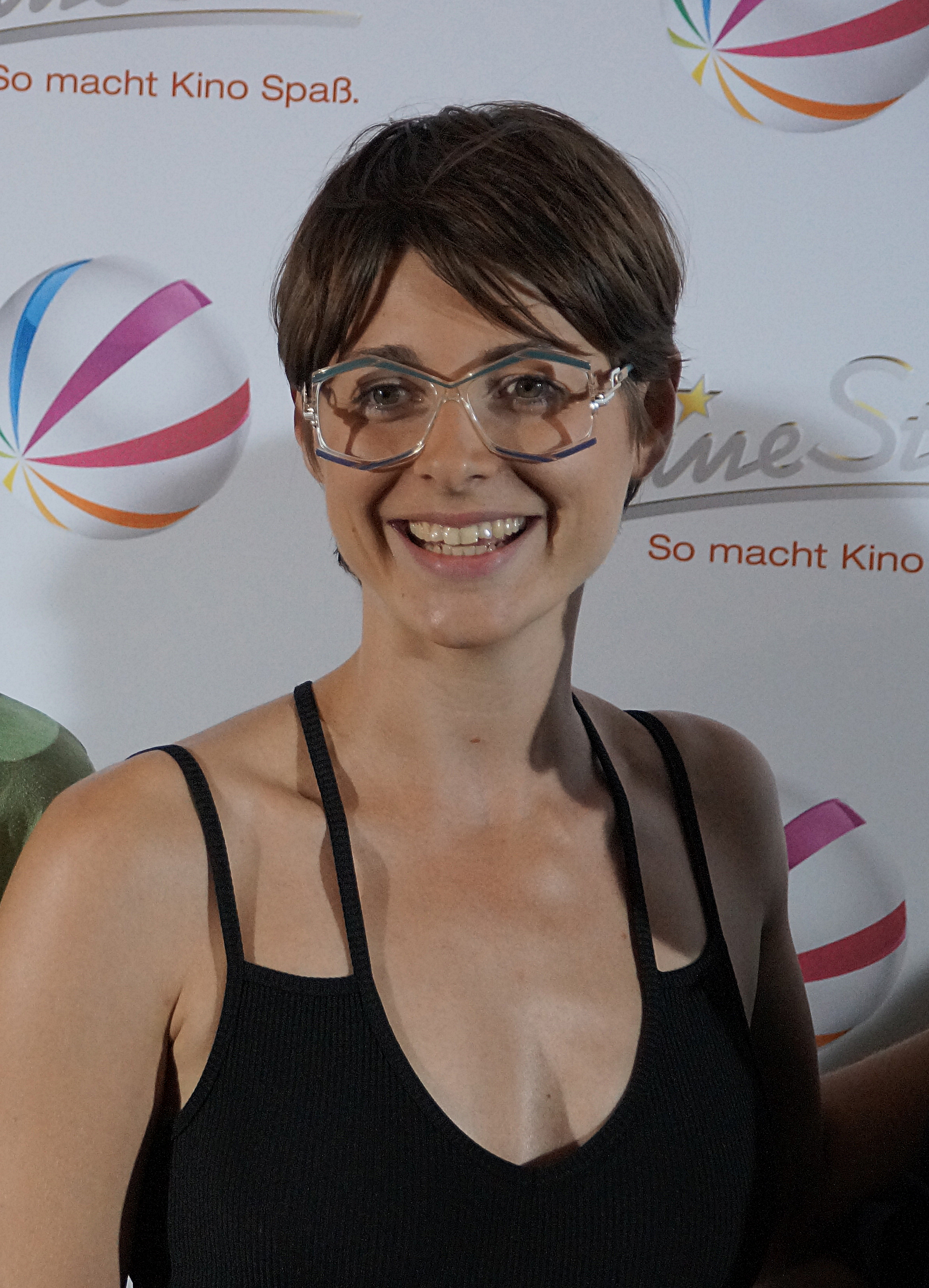 Katharina Nesytowa bei der Premiere des Sat.1 Filmes "Volltreffer", am 29.9.16, in Dortmund.